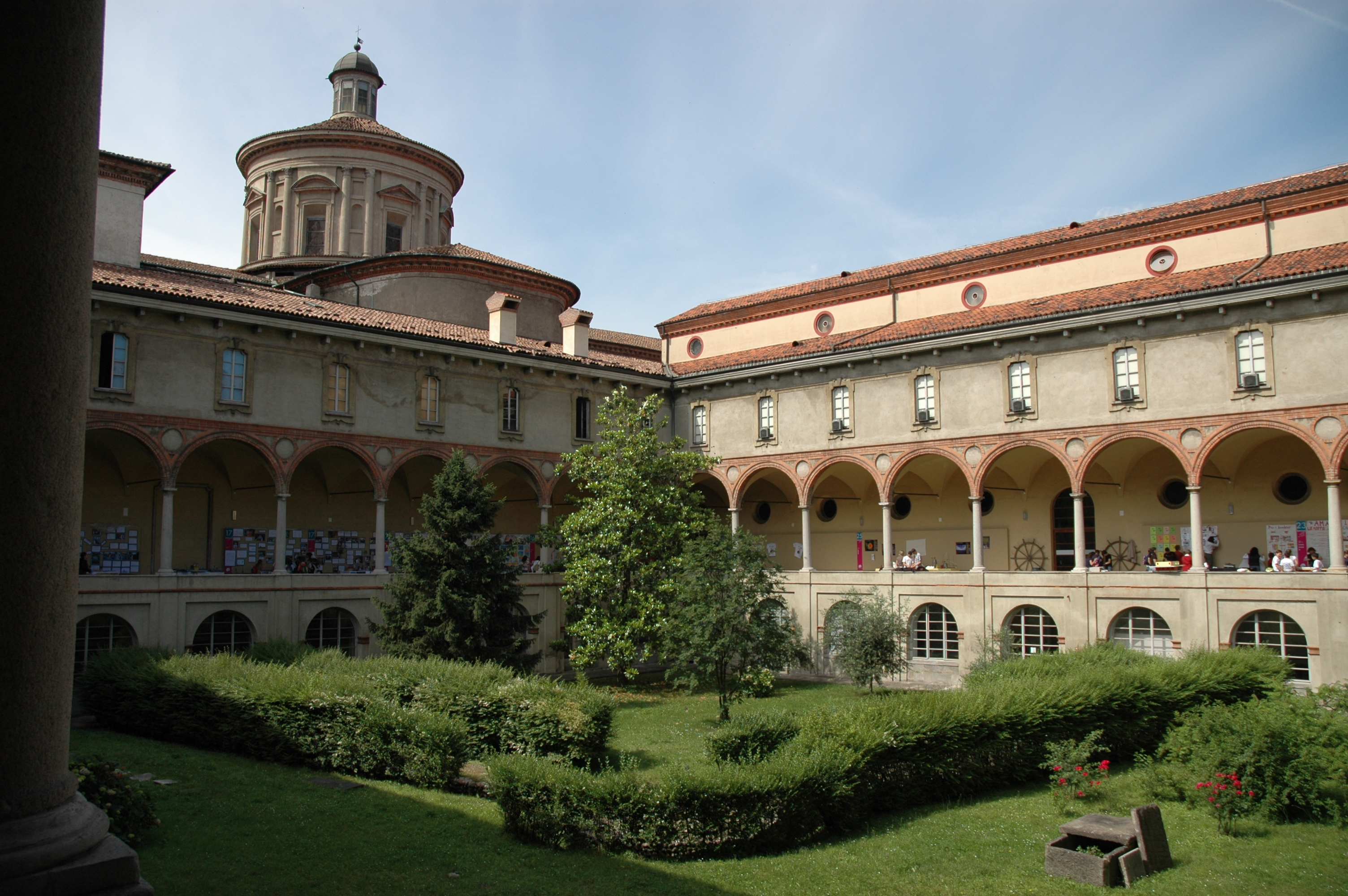 Chiostro interno del Museo nazionale della scienza e della tecnologia Leonardo da Vinci, Milano.